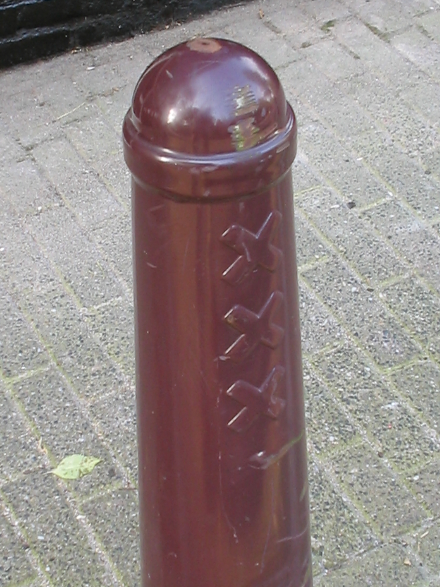 "pampertje", Amsterdam. Sept. 2005